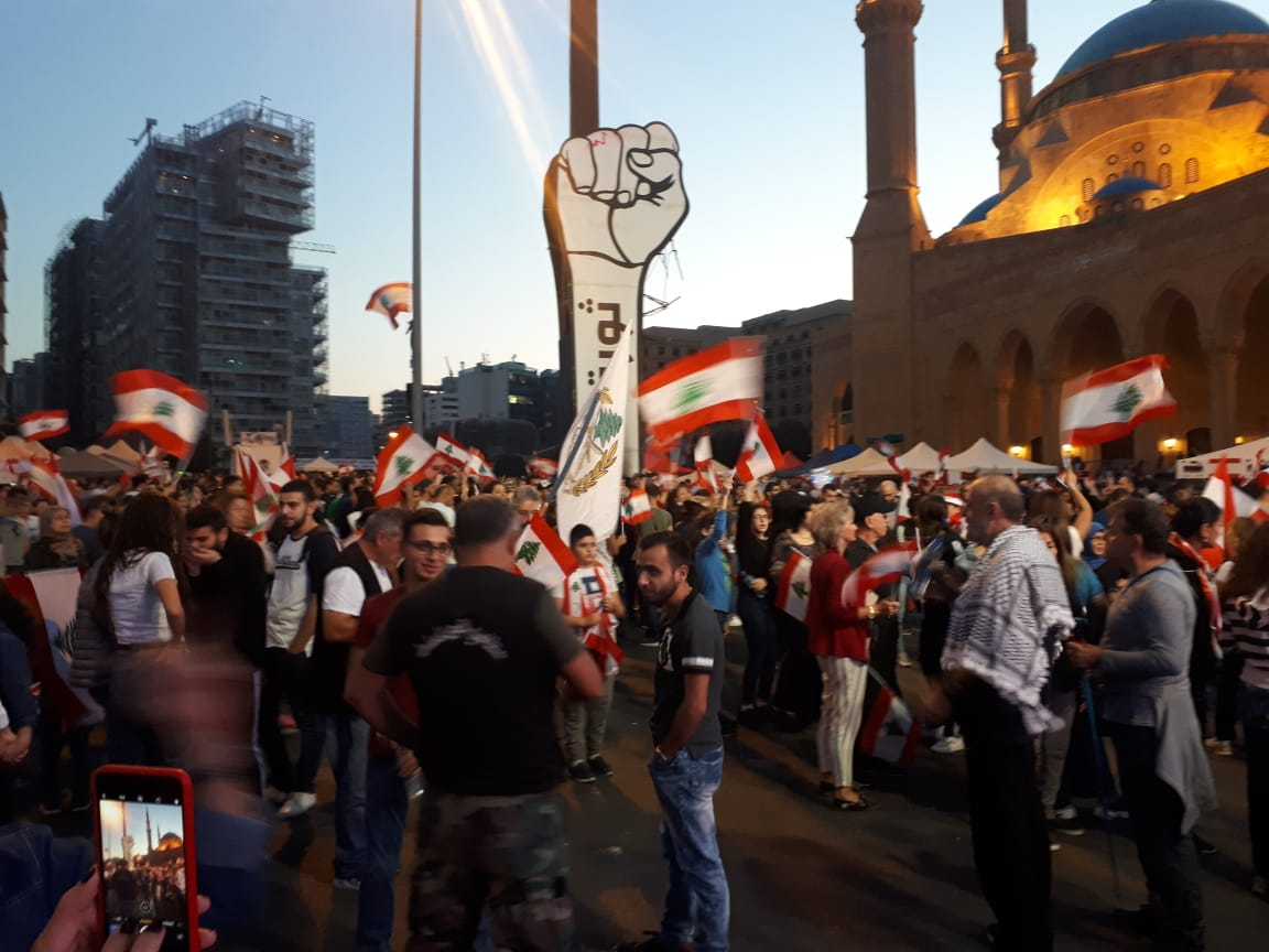 Proteste am Beiruter Märtyerplatz